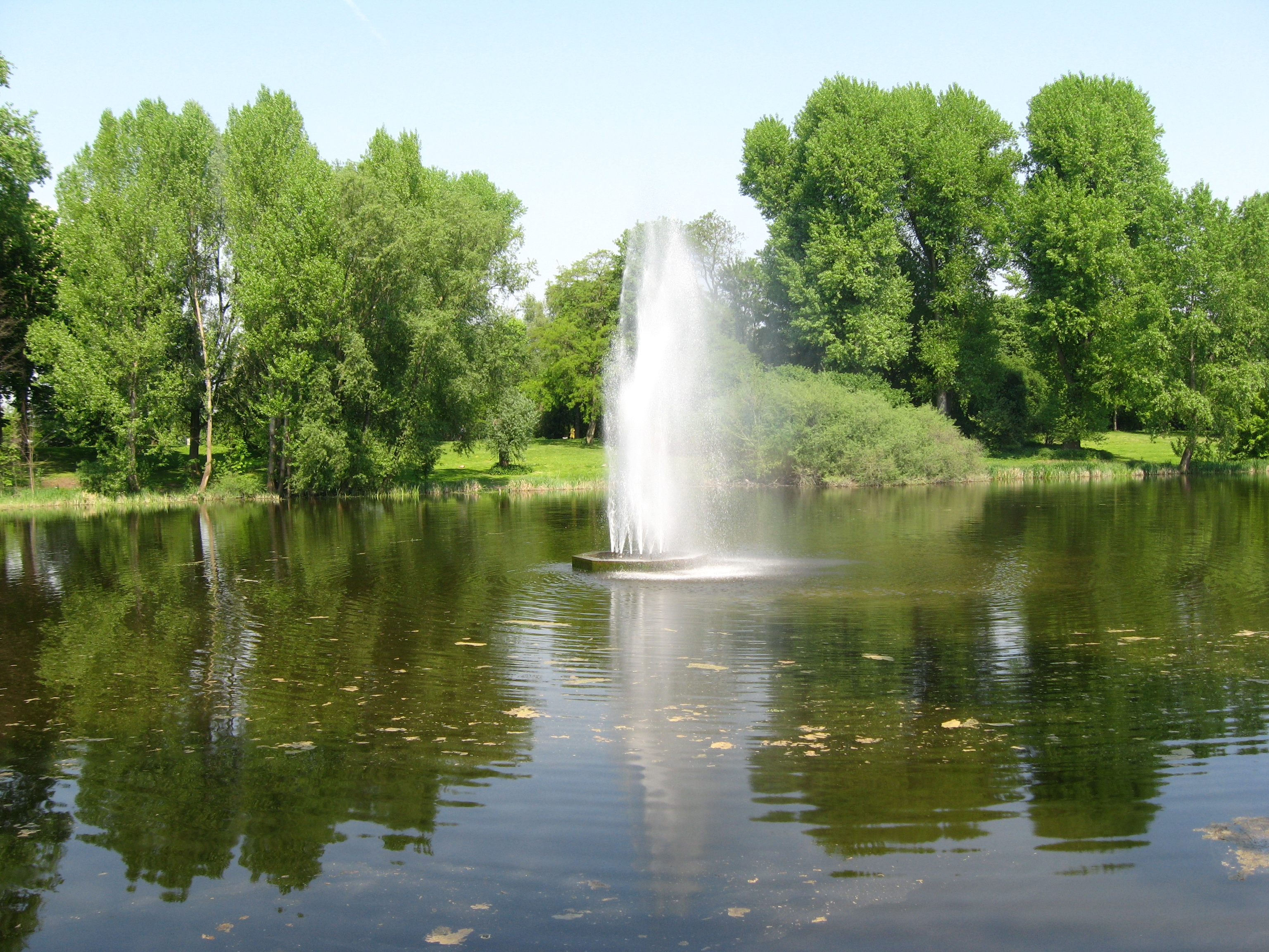 Die "Groov" in Köln-Porz-Zündorf Datum: 24.04.2011 Urheber: M. Pfeiffer alias Benutzer:Gordito1869 Quelle: privates Fotoarchiv des Urhebers